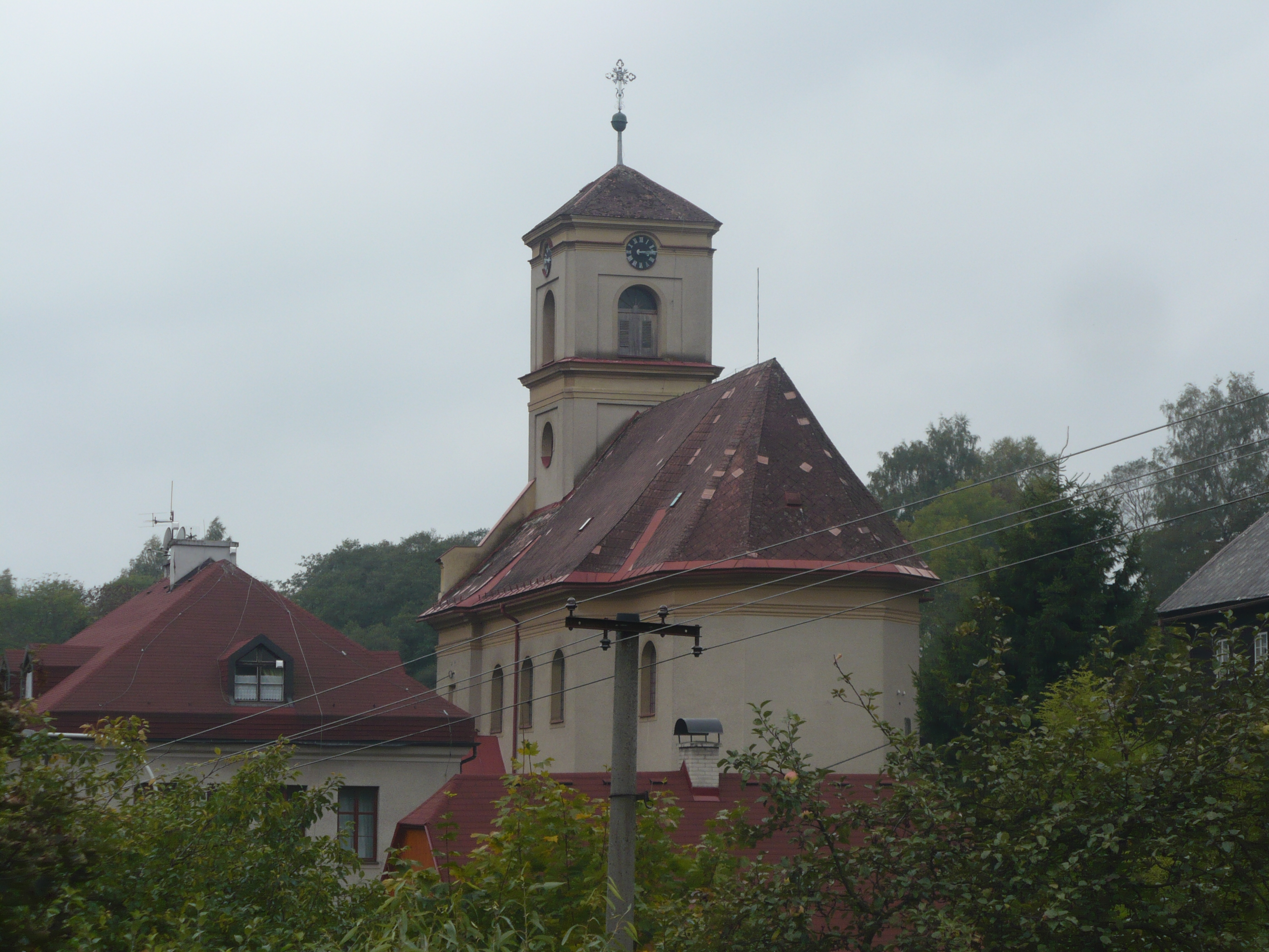 Orličky-kostel sv. Jana Nepomuckého z křižovatky